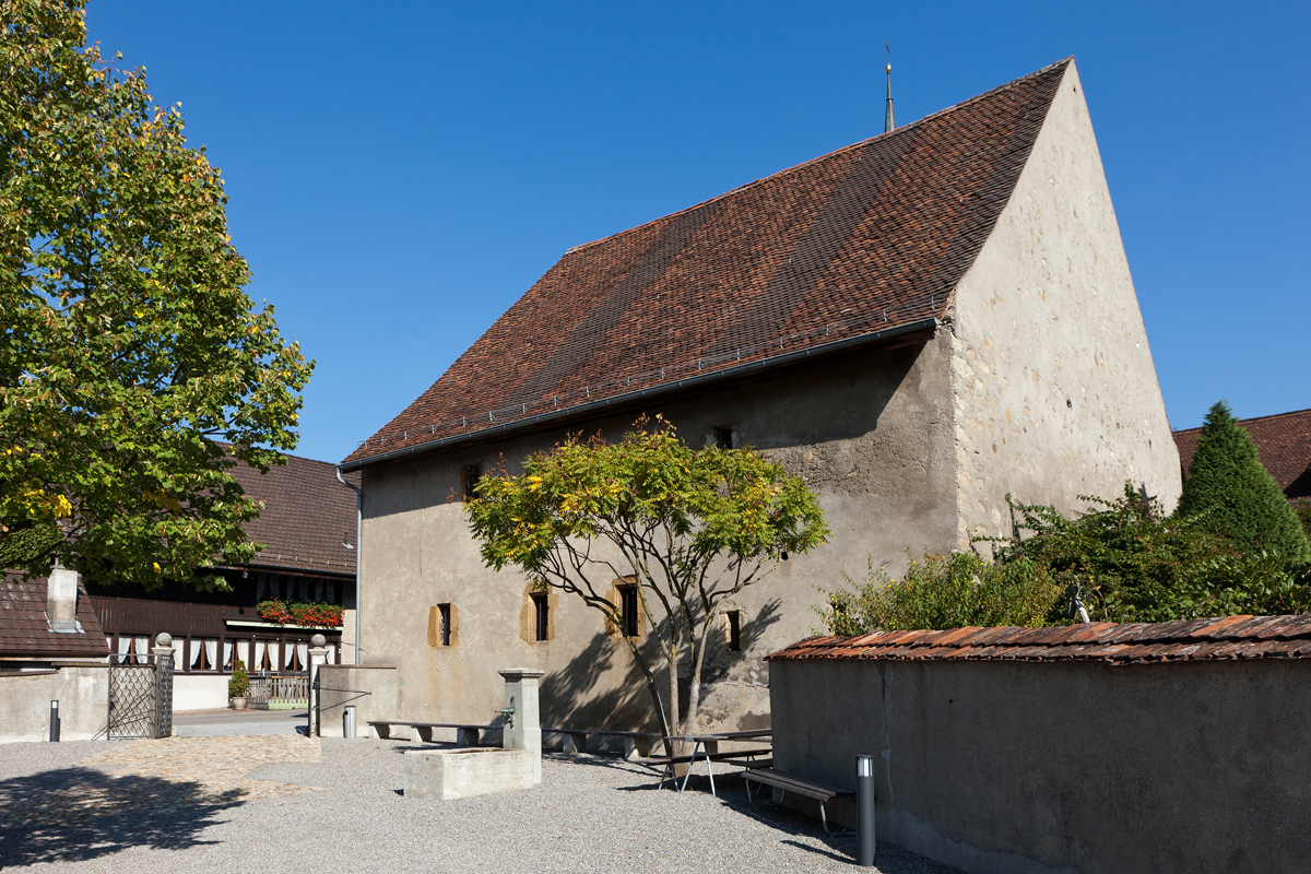 Die Pfarrscheune (Zehntenscheune) in Kirchdorf (Gemeinde Obersiggenthal) AG